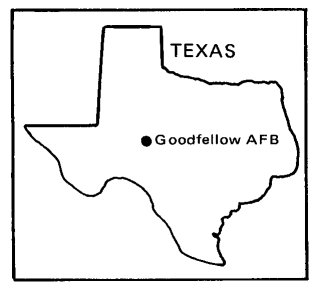 Goodfellow AFB Map